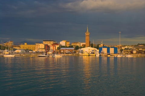 Sergio Fucchi, luglio 2008 - Panorama del porto di Civitanova Marche alle prime luci dell'alba - L'immagine è di mia proprietà ed è stata da me realizzata. Ne è consentita la duplicazione a condizione di citarne l'autore.